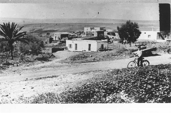 כפר מסר - כפר ערבי בגליל